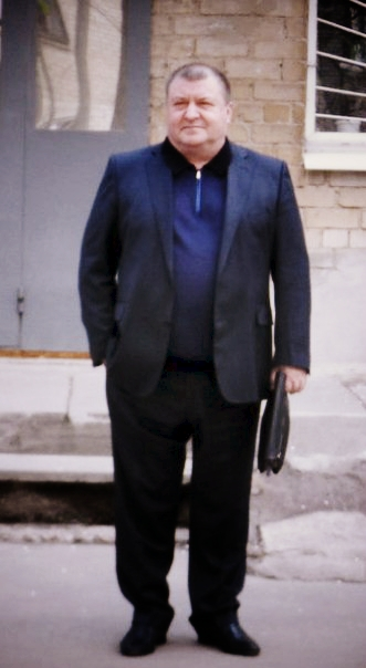 Возле суда